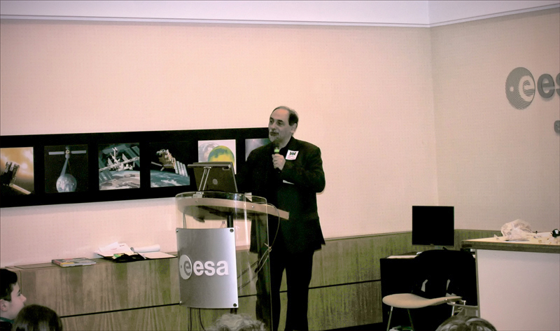 Umberto Guidoni durante un incontro pubblico presso l'ESRIN di Frascati(RM)